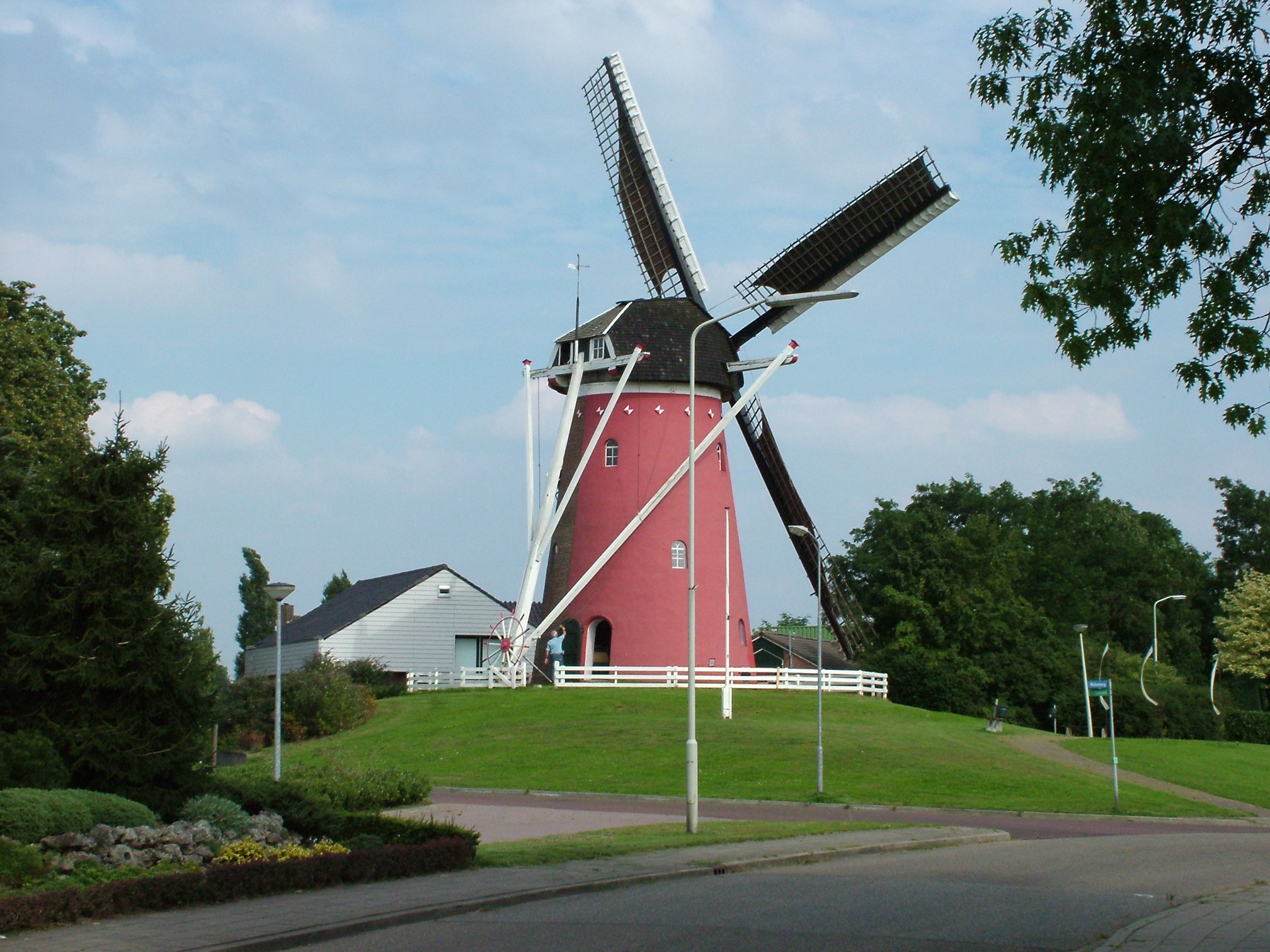 Molen in Silvolde (Oude Ijsselstreek)